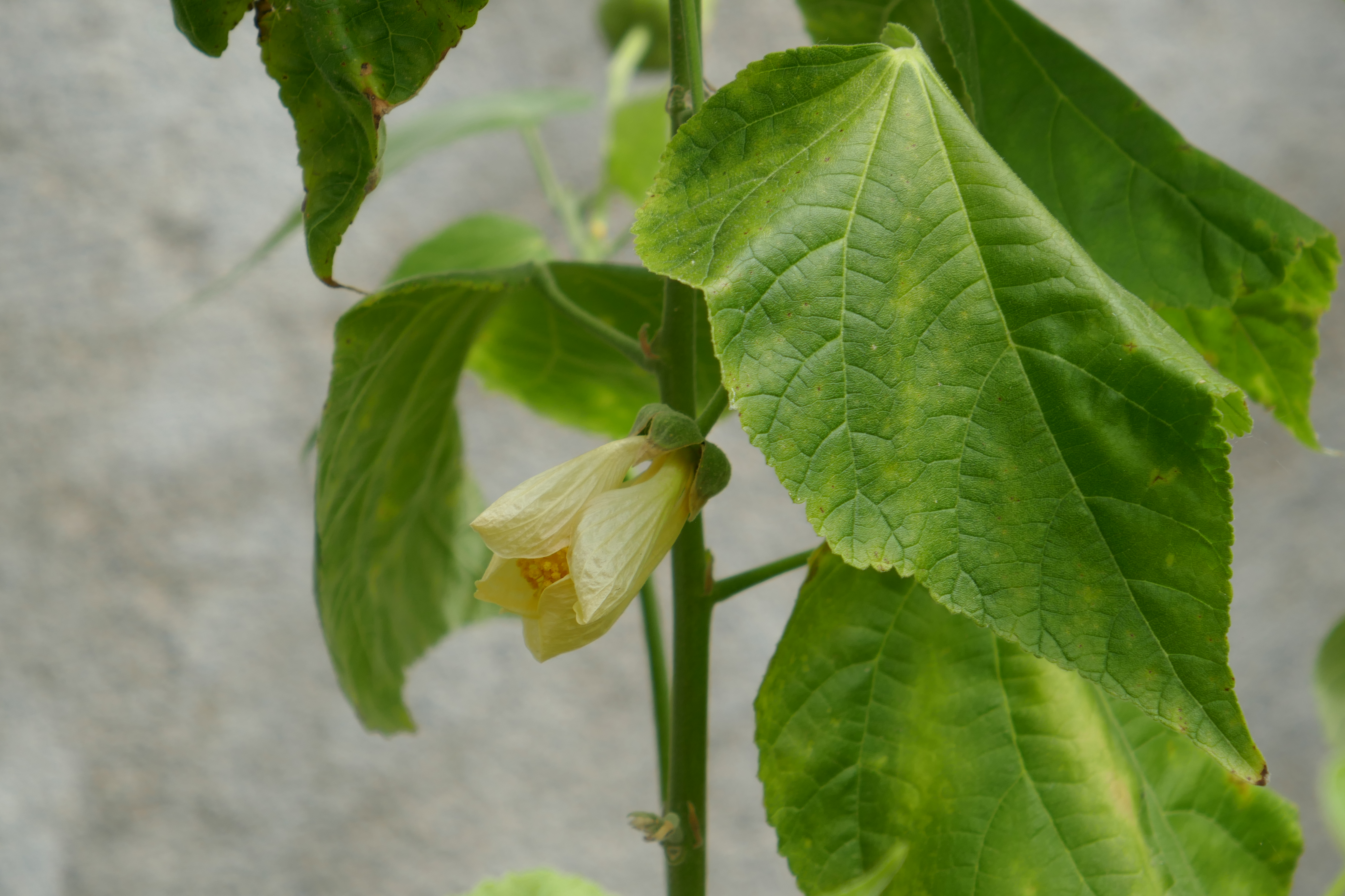 Abutilon pitcairnense, originaire de l'Île Pitcairn, cultivé dans une serre du jardin botanique national irlandais de Glasnevin, Dublin, Irlande.